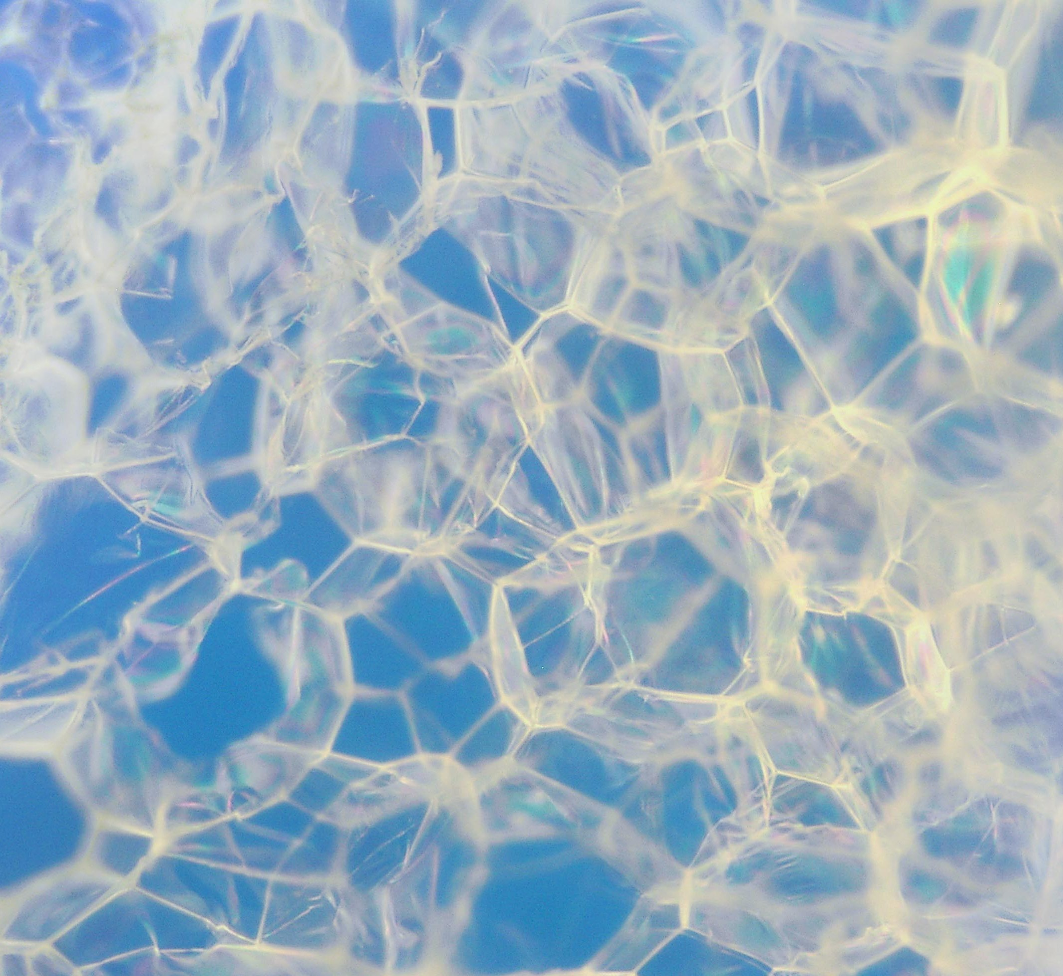 Styropor bei ca. 200 fach mit Polfilter. Ausschnitt ca: 500µm x 500µm